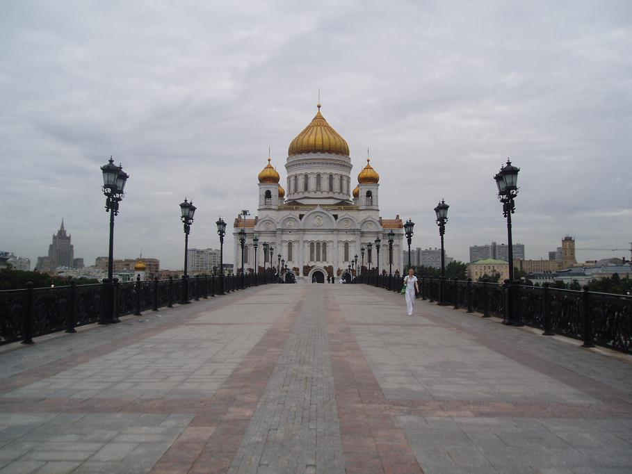 De Christus-Verlosser Kathedraal in Moskou gezien vanaf de brug.